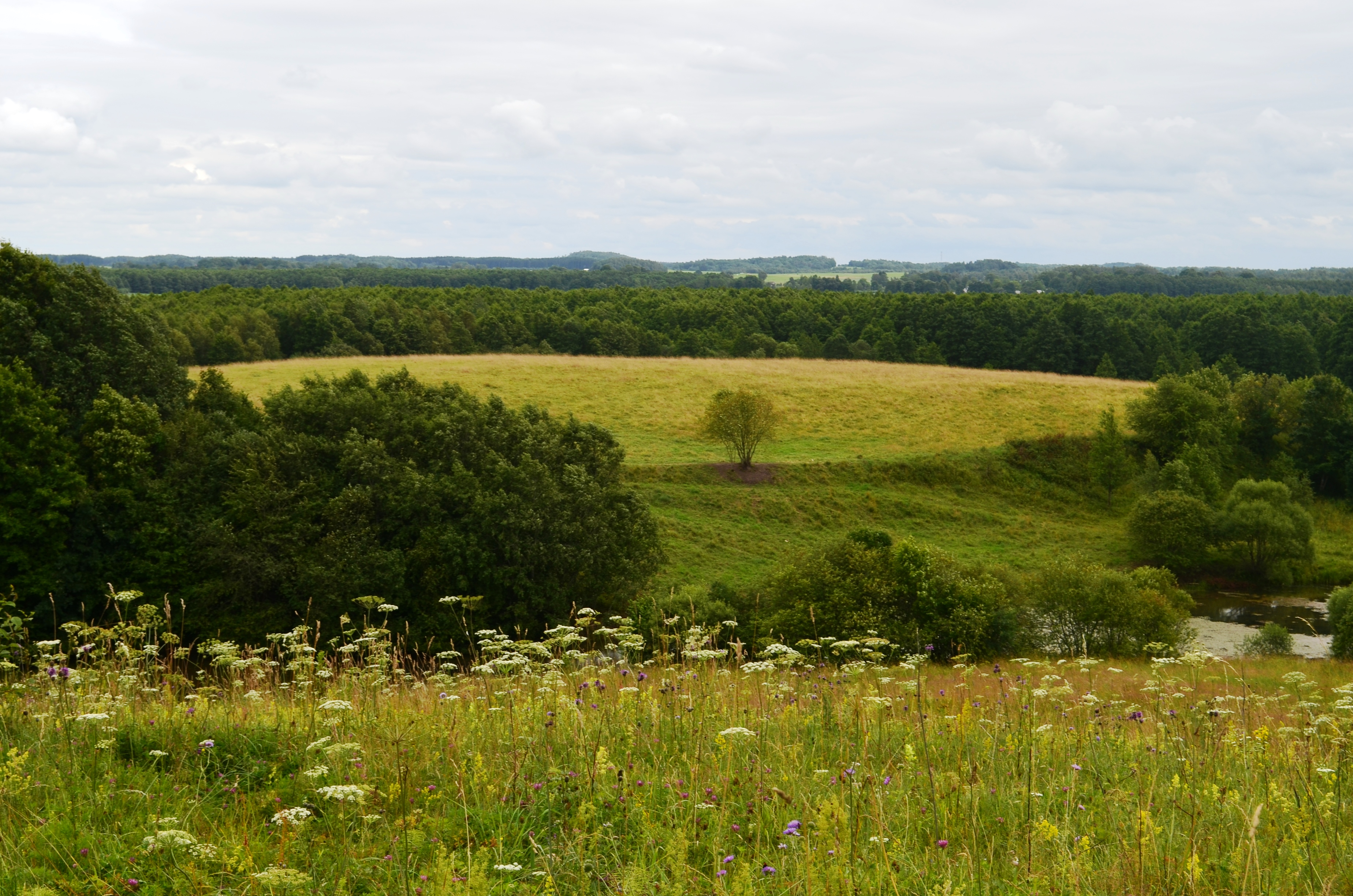 Burbiškių II piliakalnis, Šilalės raj. Žemaitėška: Borbėškiu II pėliekalnis, Šėlalės raj.